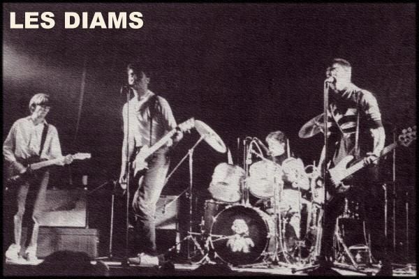 Les Diams en 1982